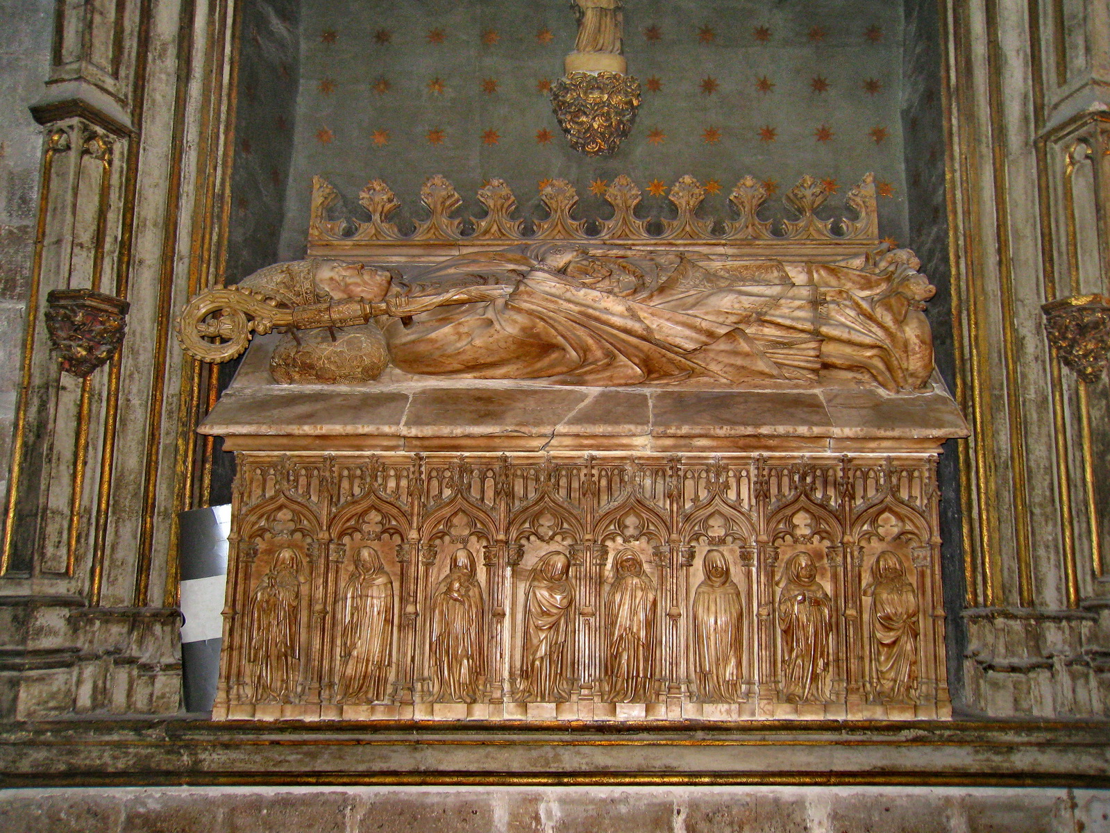 Catedral de Barcelona (Capella dels Sants Innocents). Sepulcre del bisbe Ramon d'Escales, per Antoni Canet, s. XV